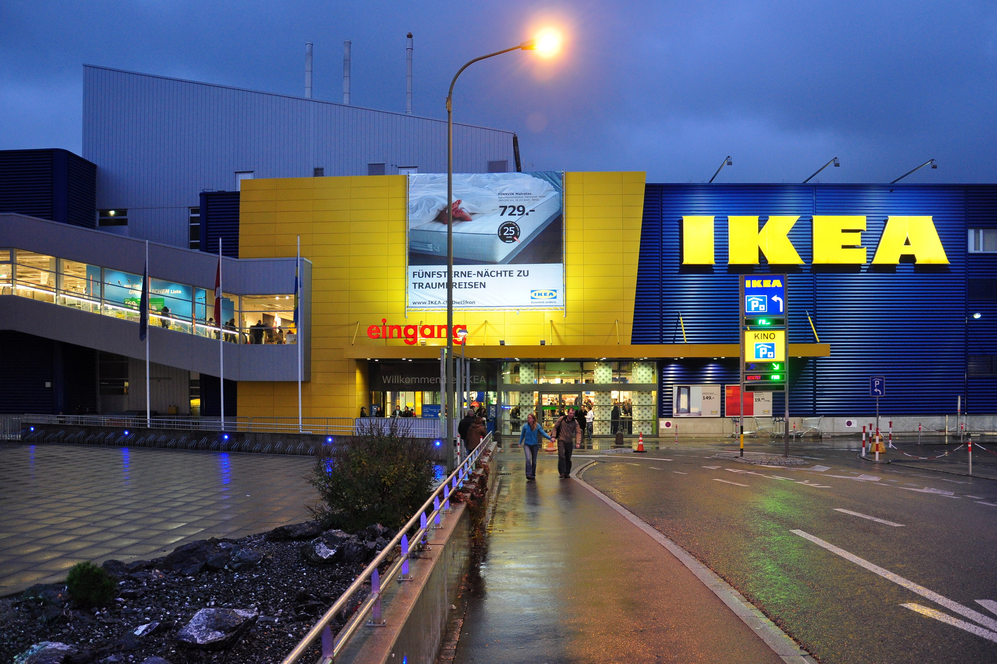 Dietlikon (Switzerland)